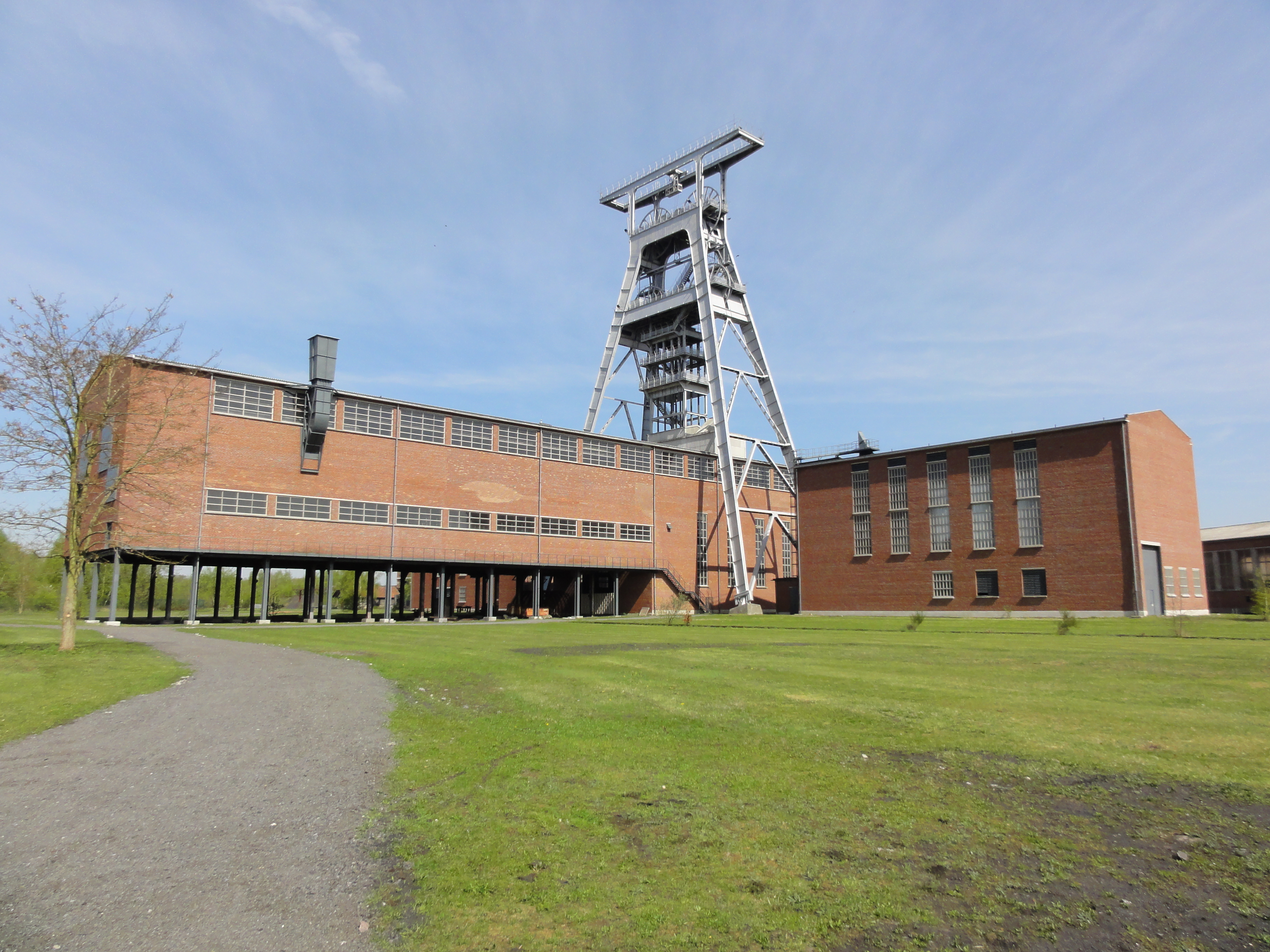 Ce document a été réalisé avec l’aimable autorisation de la Communauté d'agglomération de la Porte du Hainaut. Français | +/−